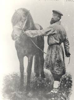 Жеребец Гнедко крестьянина Куклина. Фото из книги проф. М.И. Придорогина «Лошадь вятской губернии», 1902 г.